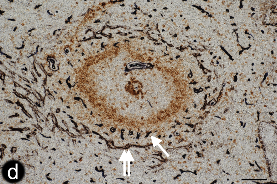 Fig. 4. Localización de la red capilar perifolicular en relación con las células del estroma, las células de memoria B y los plasmablastos en bazo humano. (d) Doble tinción para CD34 (negro) y CD27 (marrón) en una sección de parafina. La red capilar positiva CD34+ se encuentra en un área superficial del folículo con células B CD27+ dispersas. La flecha doble muestra capilares perifoliculares. La flecha simple indica seno sanguíneo. Bazo humano. Barra de escala= 100μm.